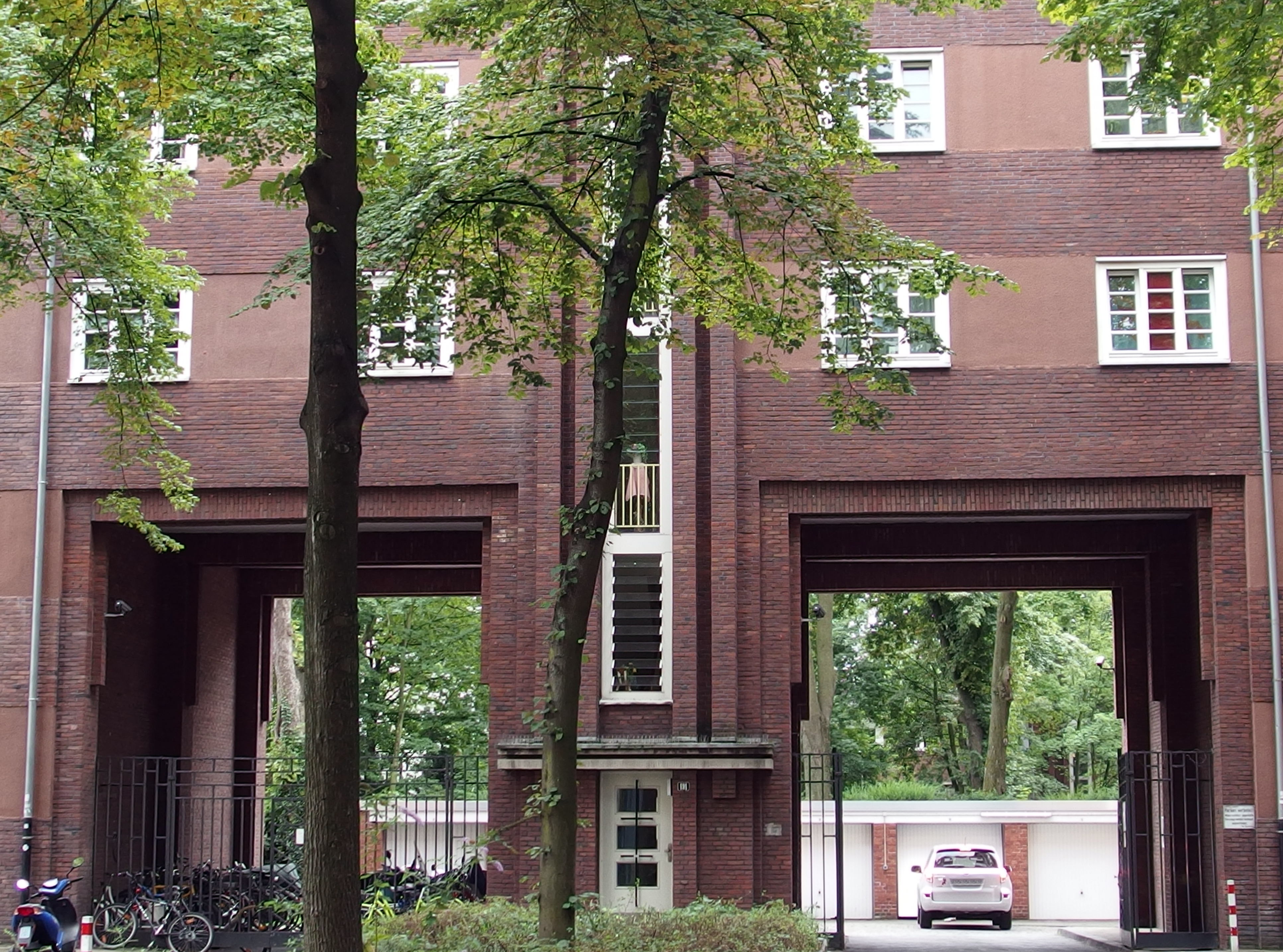 Wohnbebauung Eulerhof in Düsseldorf-Flingern, Tordurchfahrten an der Lindenstraße